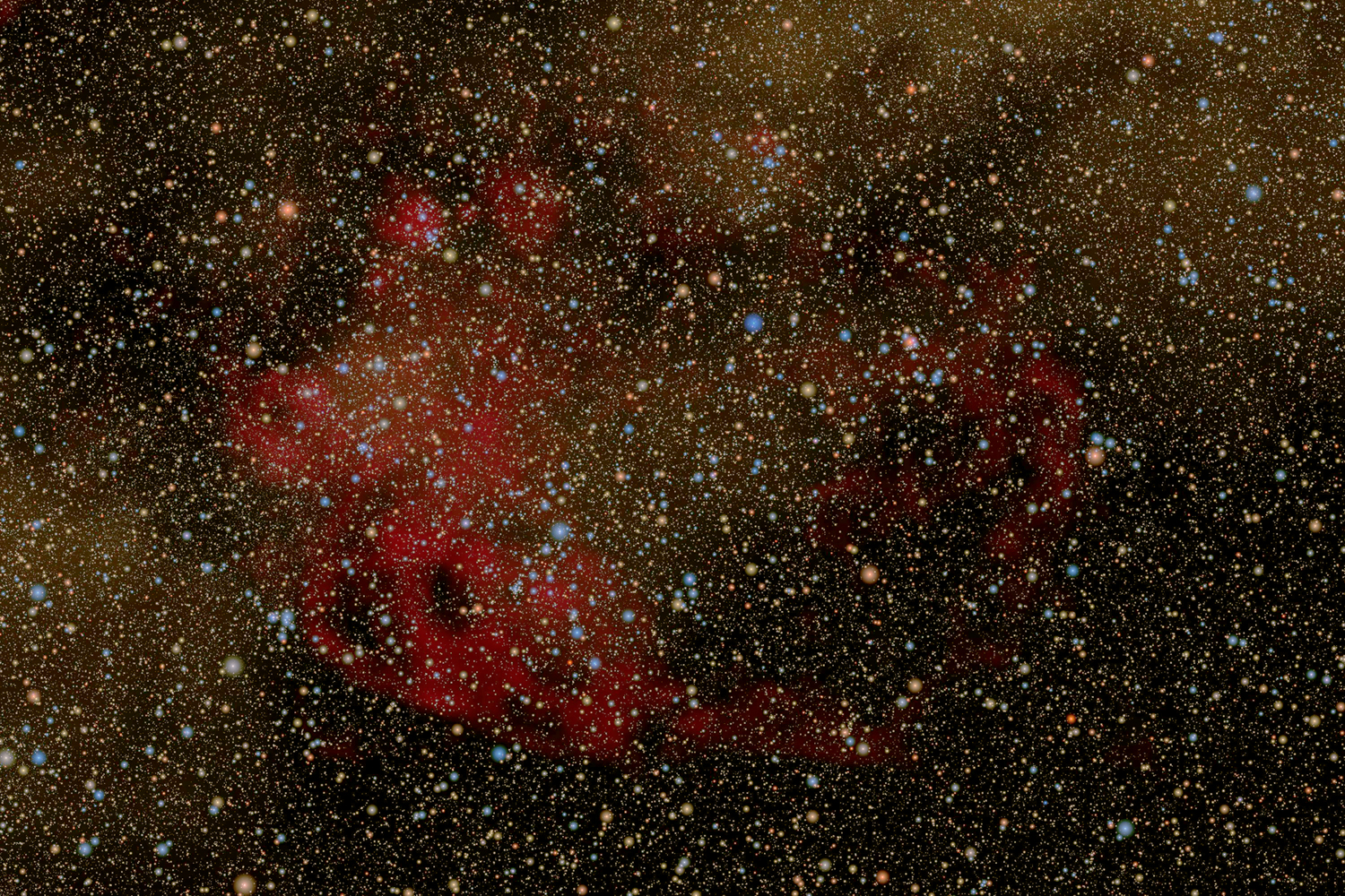 Gum Nebula